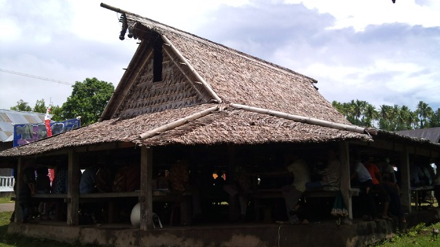 Rumah aadat Sasadu di Desa Gamtala, Jailolo, Halmahera Barat. Desa Gamtala, Lolori, Marimbati, diproyeksikan sebagai desa wisata.